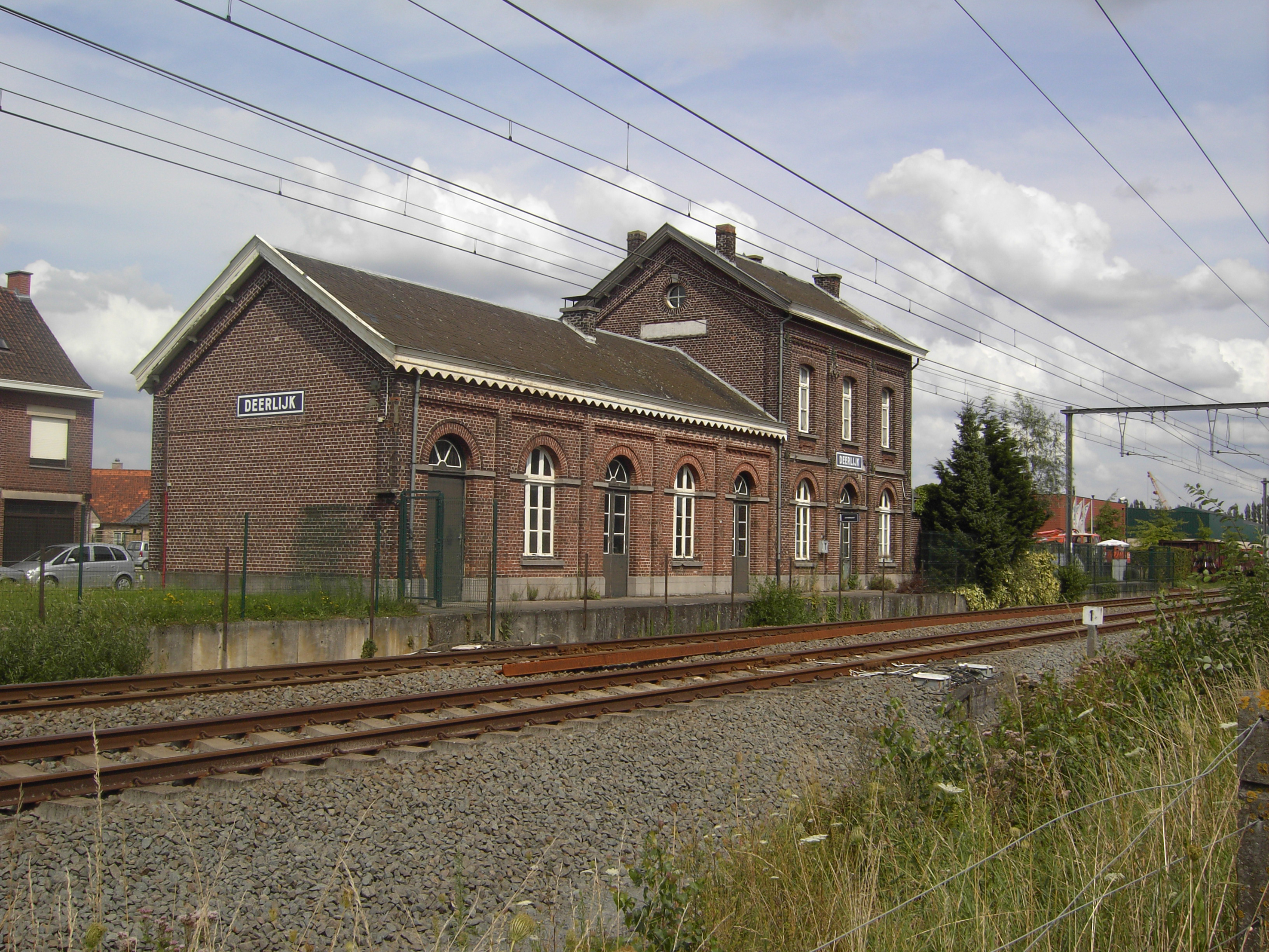 Deerlijk - station - West-Vlaanderen - België